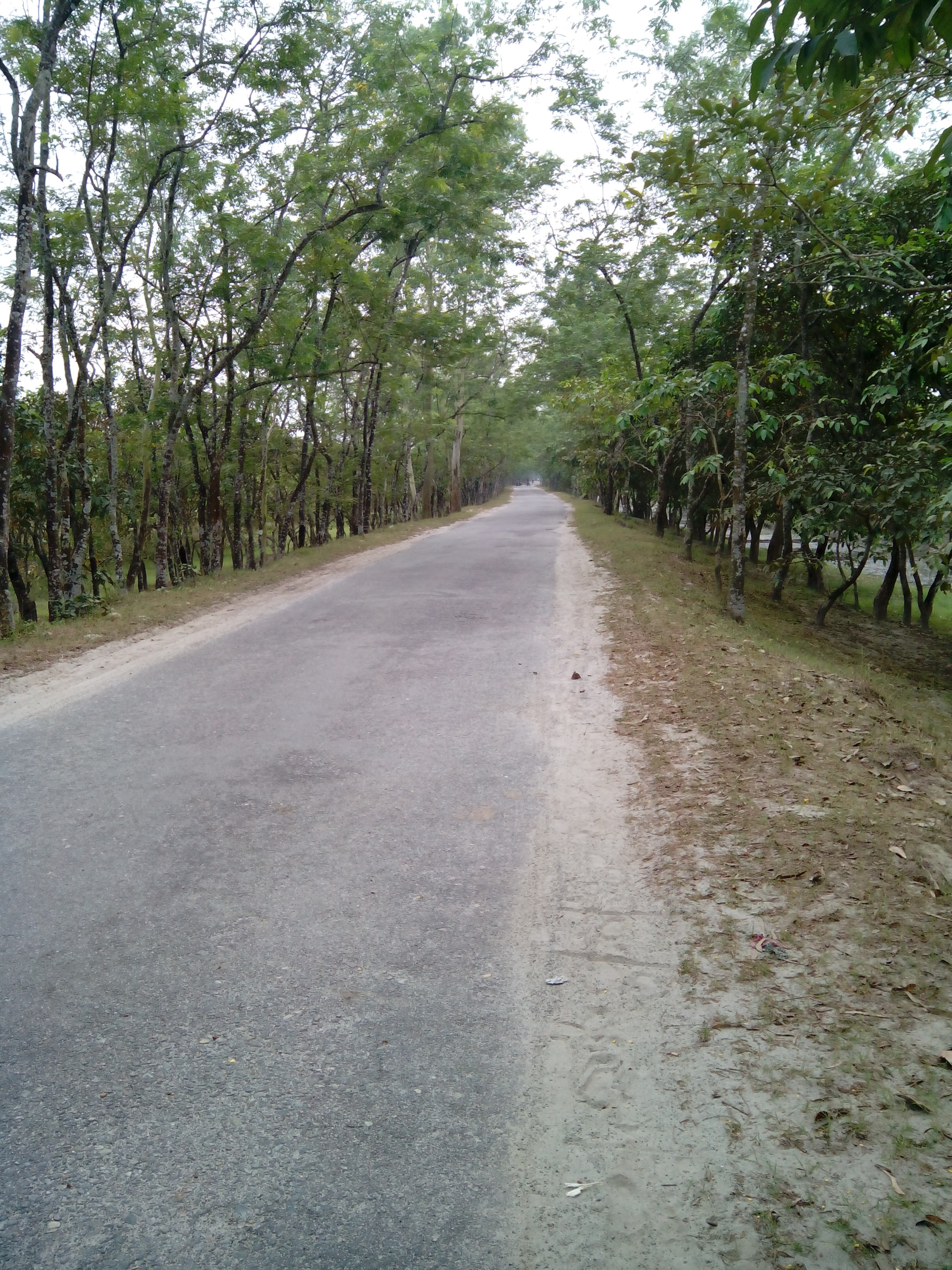 দক্ষিণ সুন্দরখাতা সংরক্ষিত বনাঞ্চলের নিকটে উপজেলা সড়ক ২০০৭ (ডোমার-ডিমলা সড়ক)